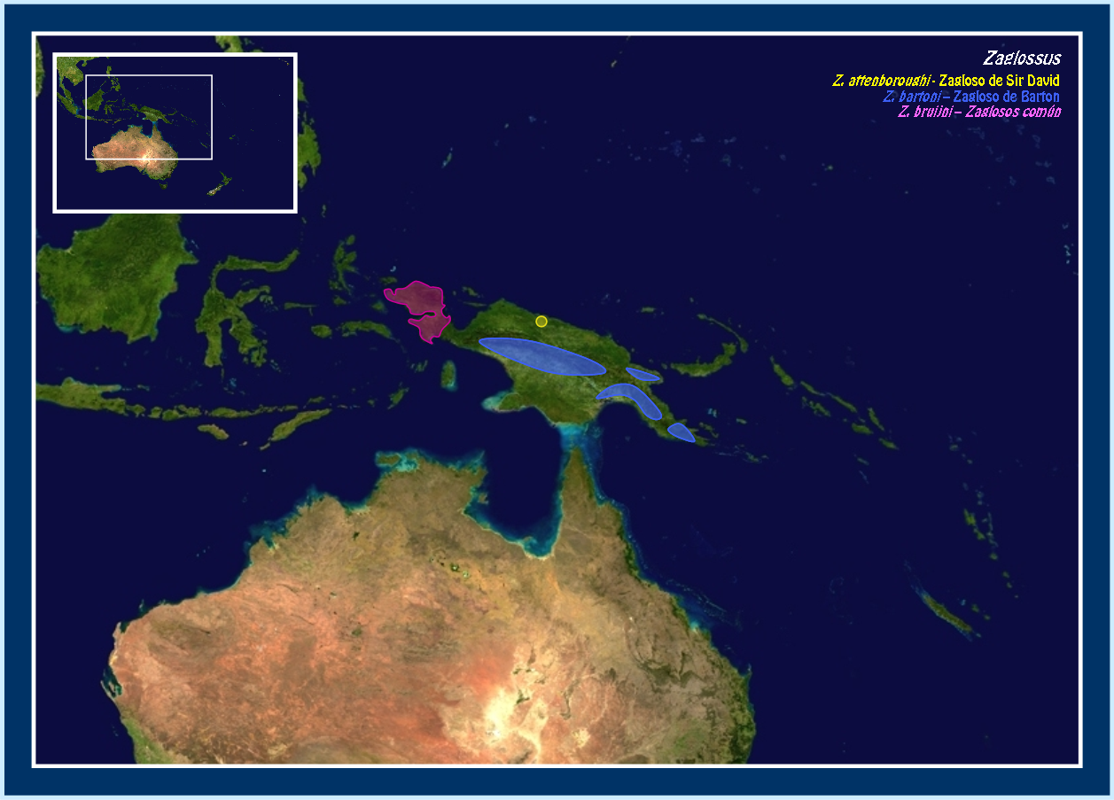 Mapa del área de distribución de Zaglossus sp.: Zaglossus attenboroughi Zaglossus bartoni Zaglossus bruijni